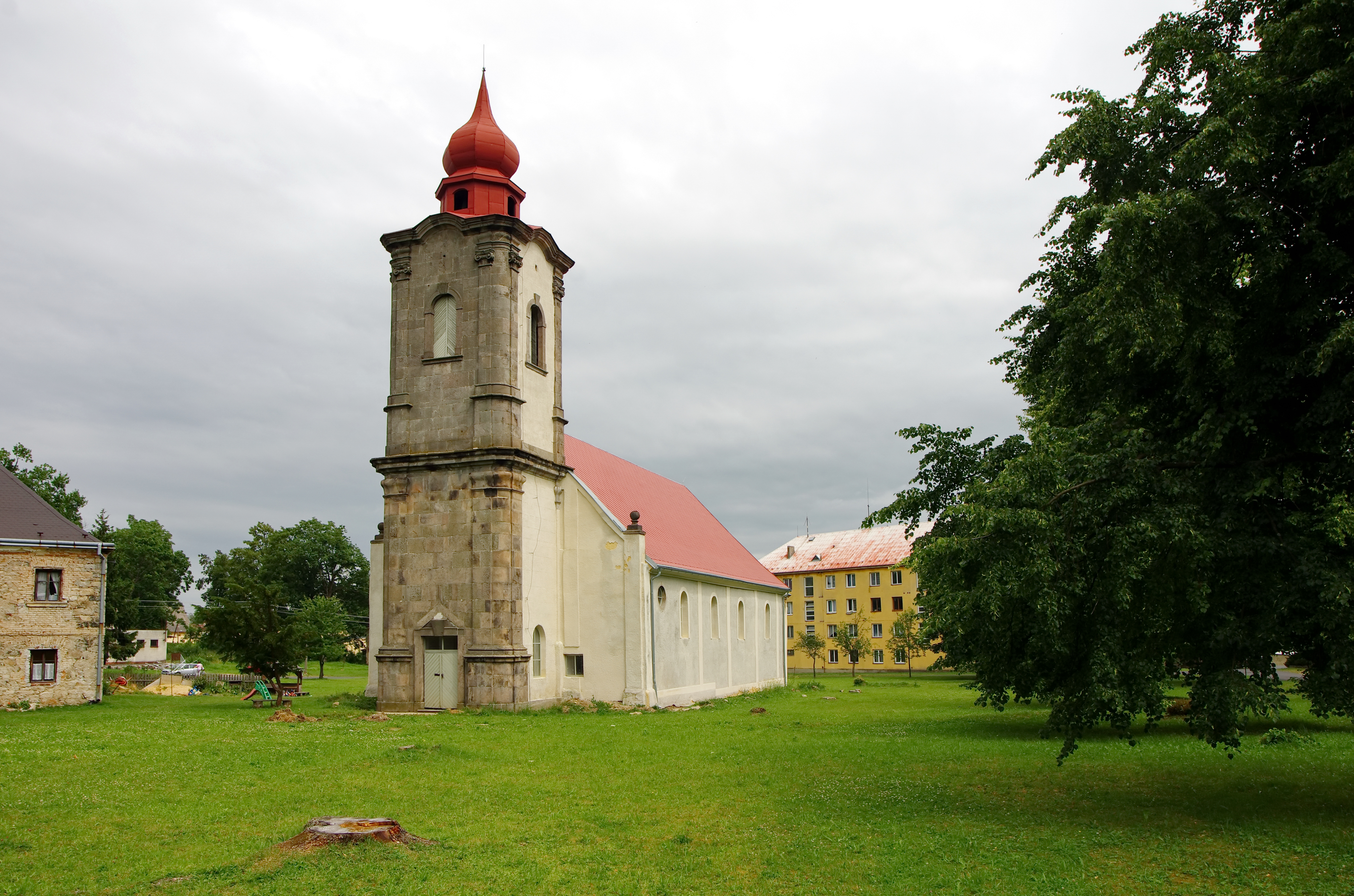 Kostel Nejsvětější Trojice (Nová Ves)